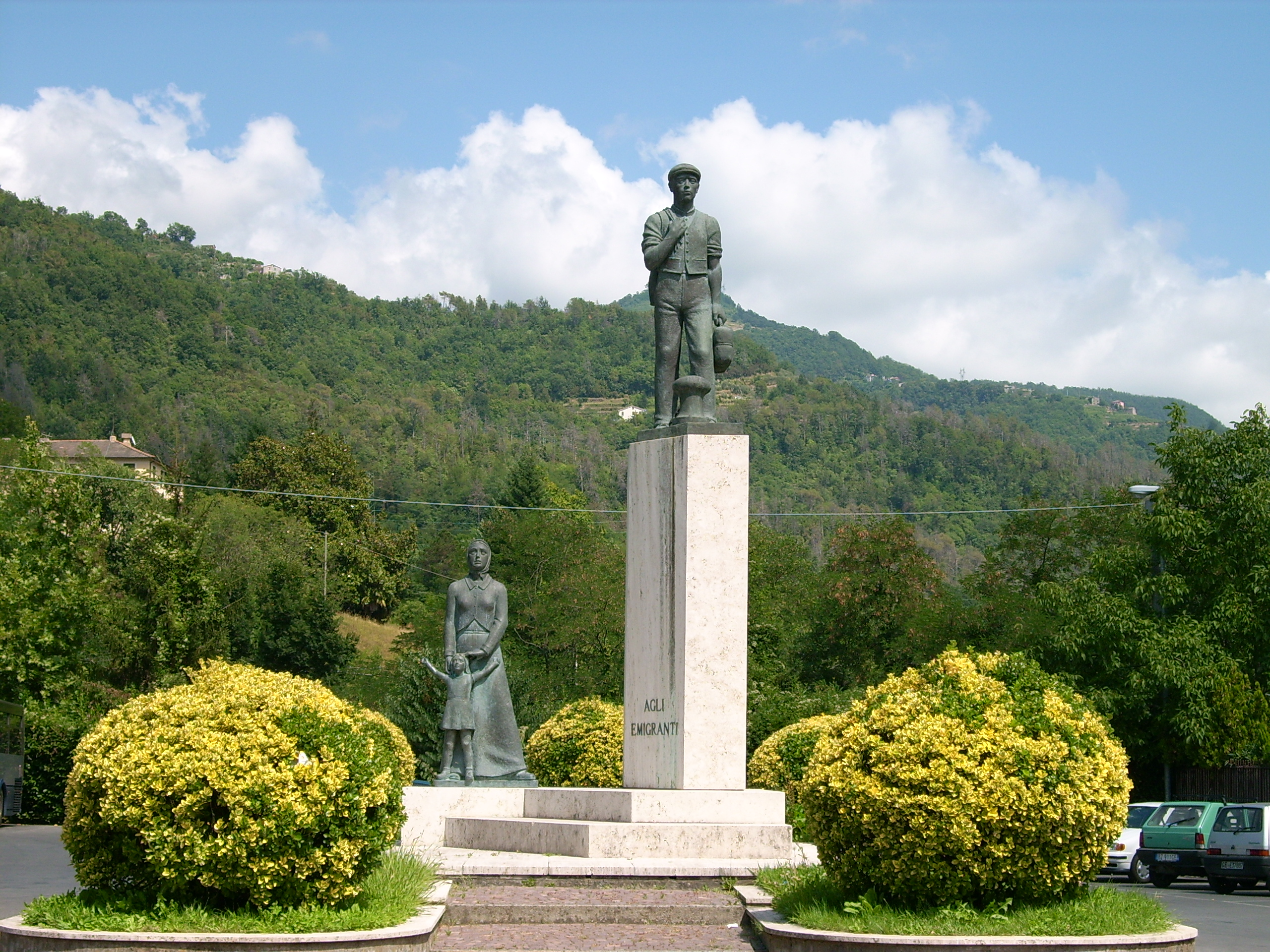 Monumento all'emigrante presso Cicagna, Liguria, Italia